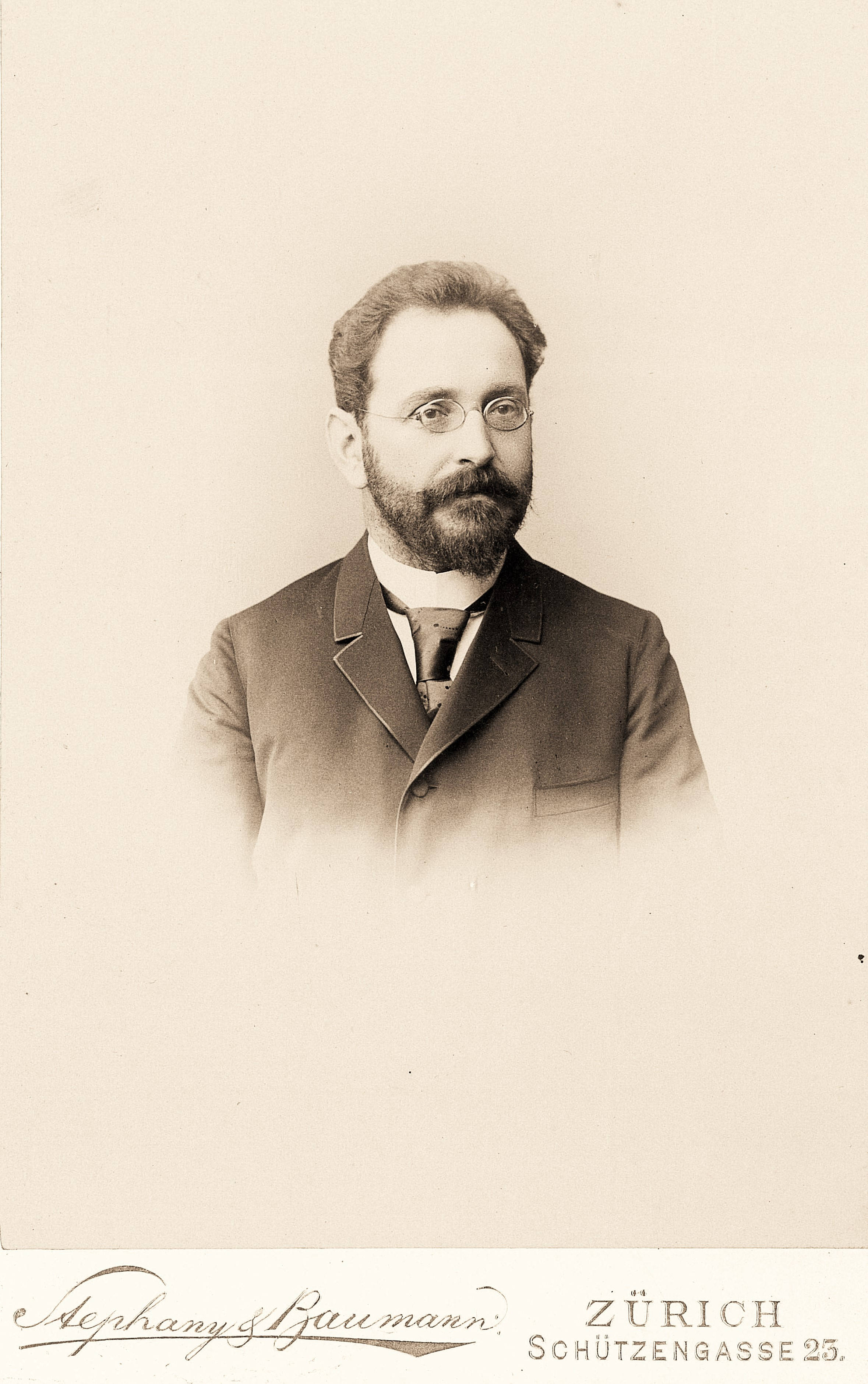 Schweizer Seidenkaufmann sowie Politiker auf kantonalzürcherischer und kommunaler Ebene